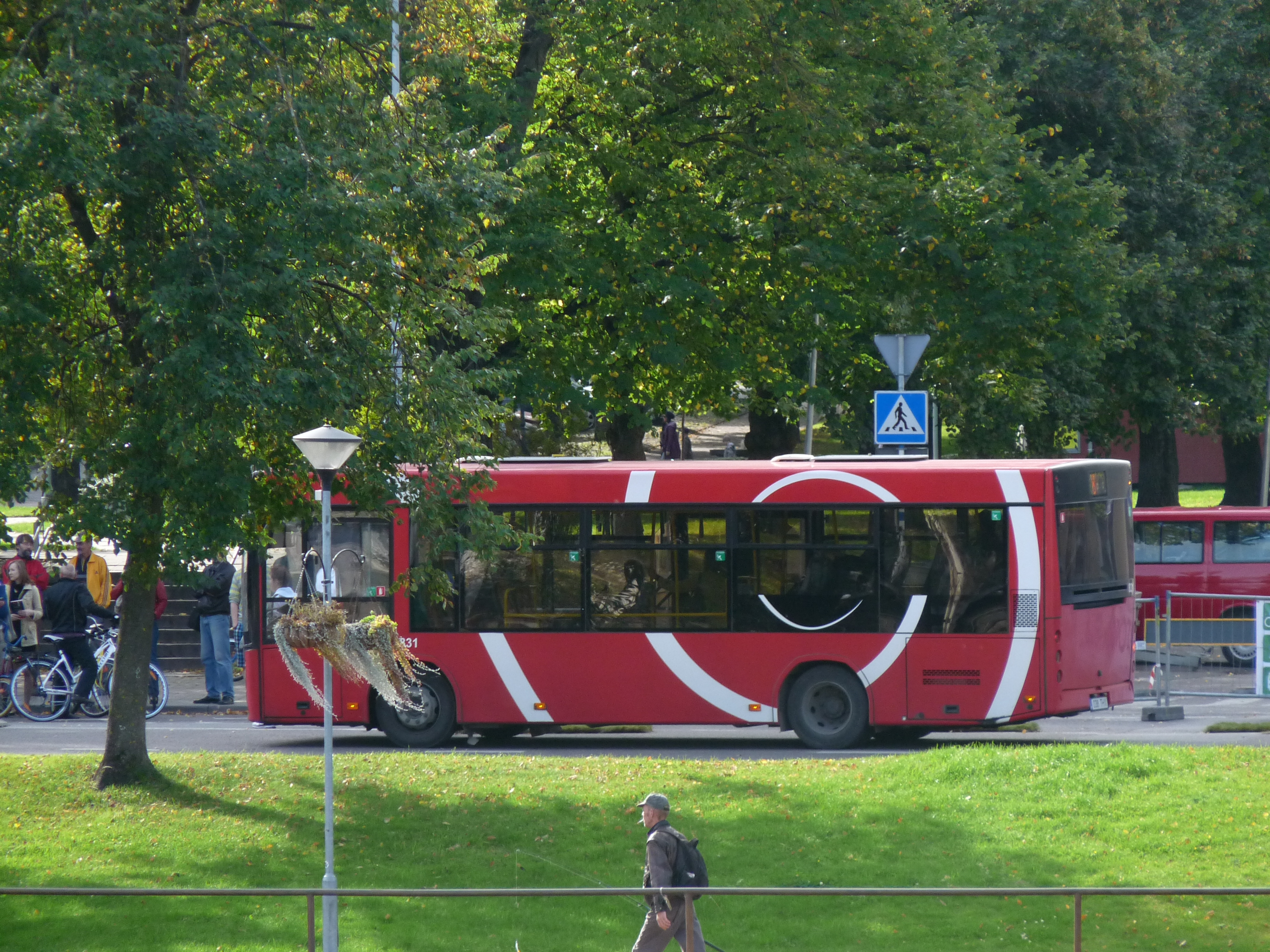 Linnaliinibuss Tartus, 22. september 2012